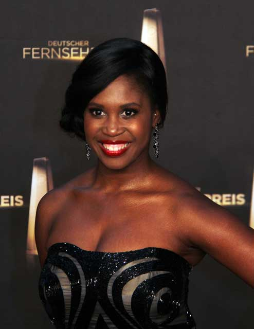 Motsi Mabuse beim Deutschen Fernsehpreis 2012